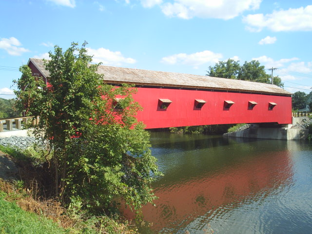 Buskirk Covered Bridge